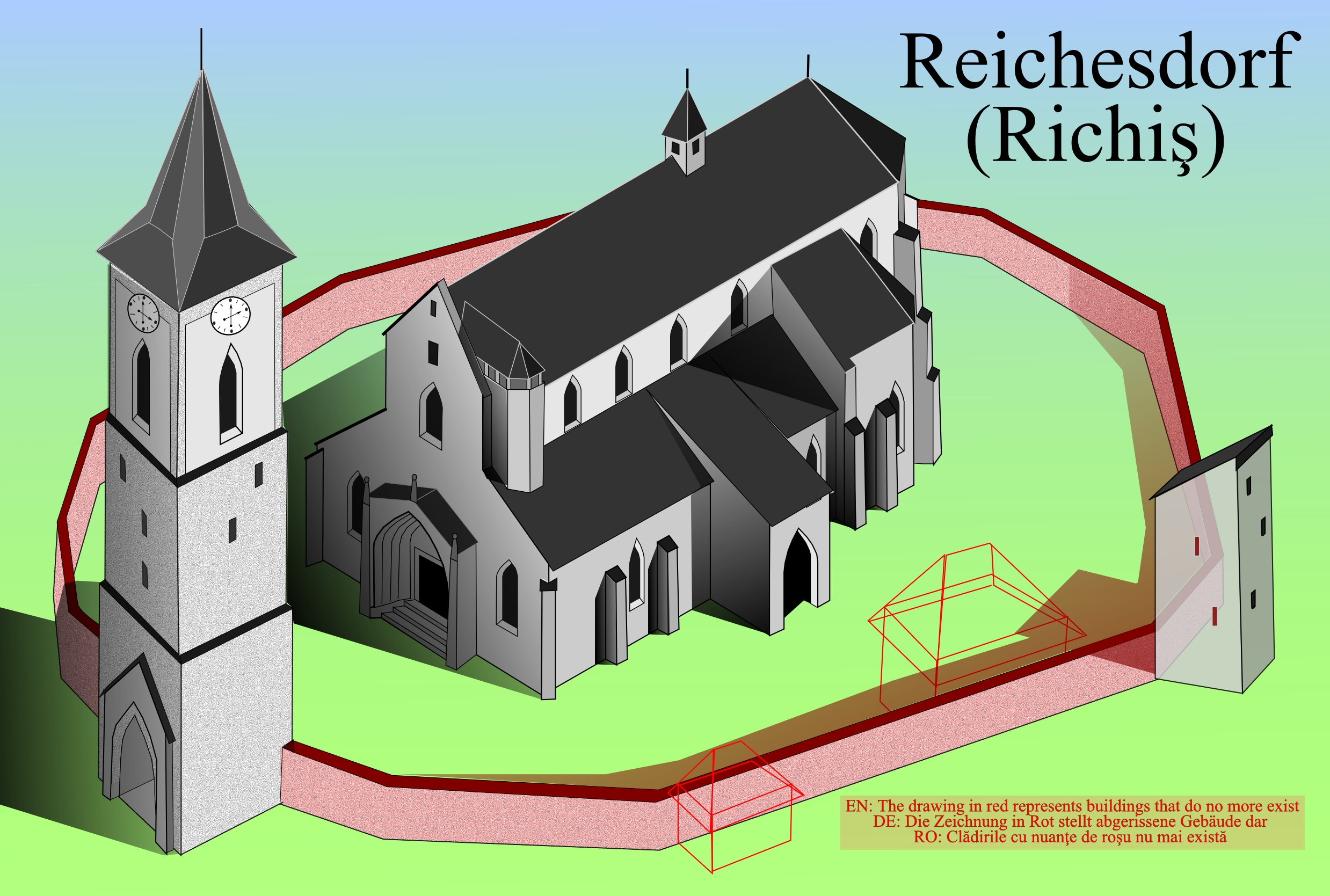 Biserica fortificata din Richis.